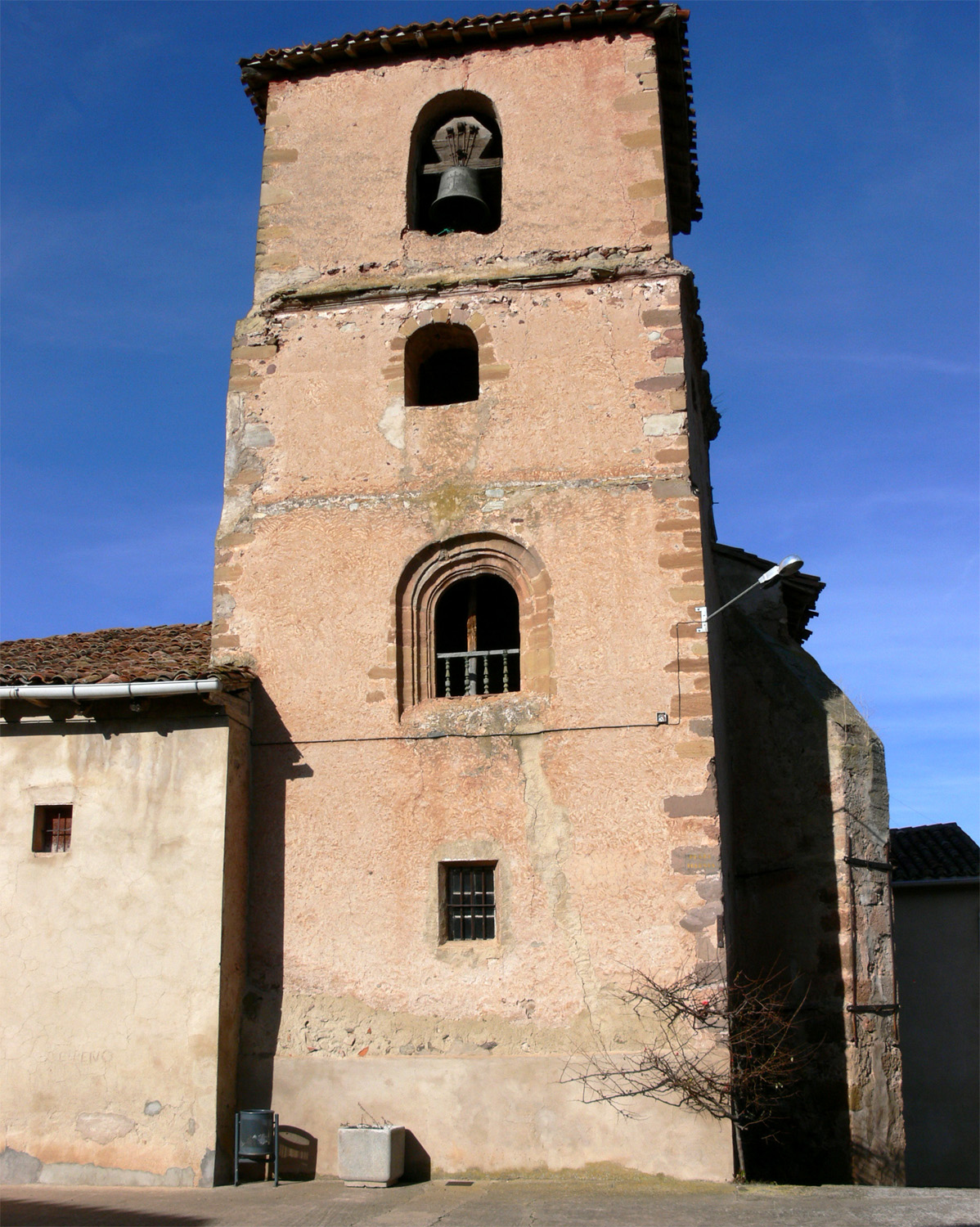 Iglesia de San Andrés en el barrio de San Andrés del Valle, Estollo, La Rioja (España).